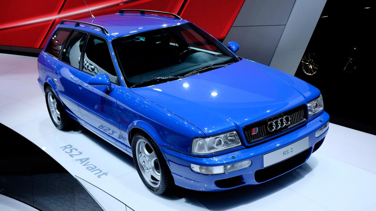 Audi RS2 Avant no museu da Audi em Ingolstadt, Alemanha.